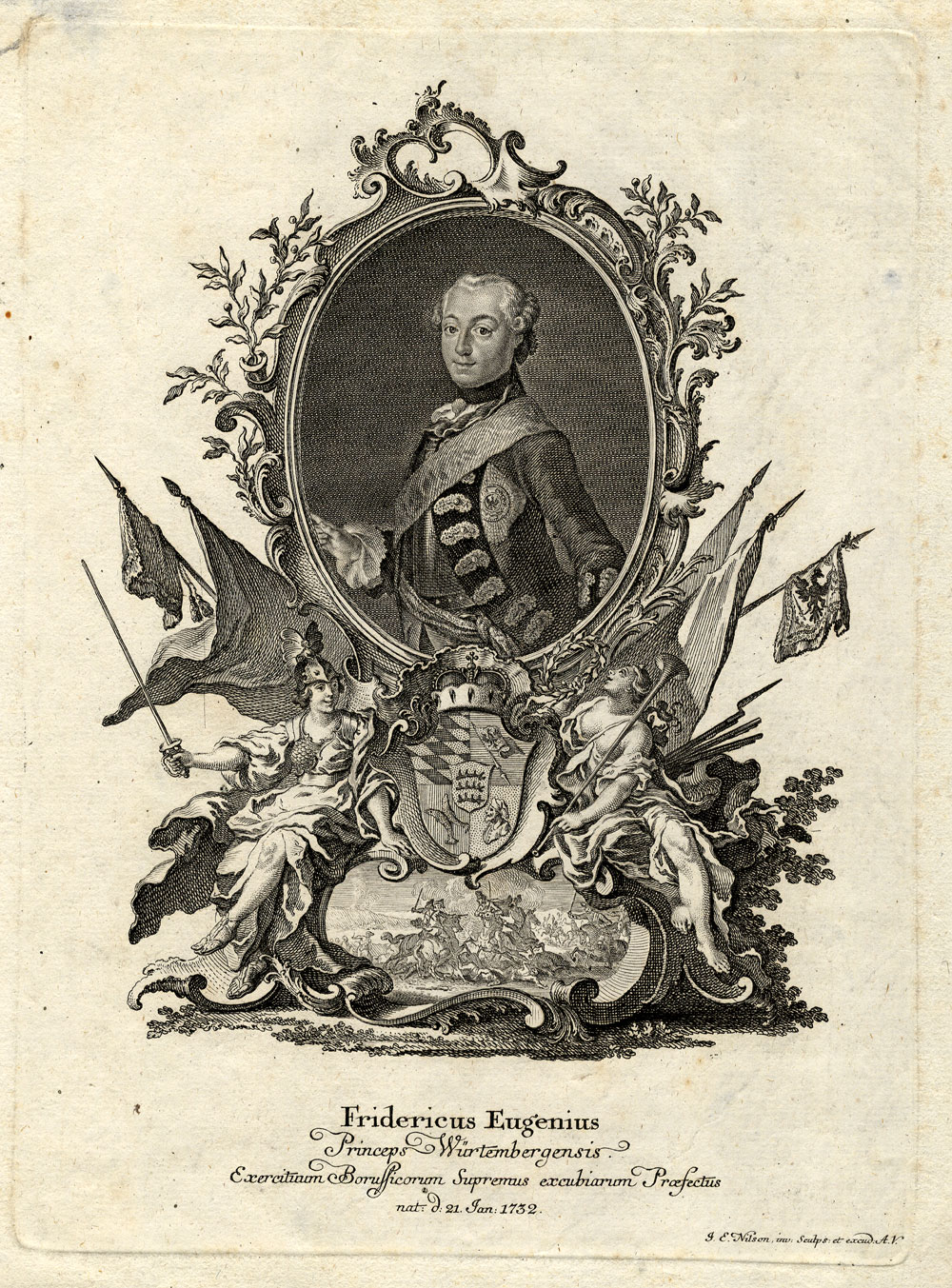 Herzog Friedrich Eugen von Württemberg